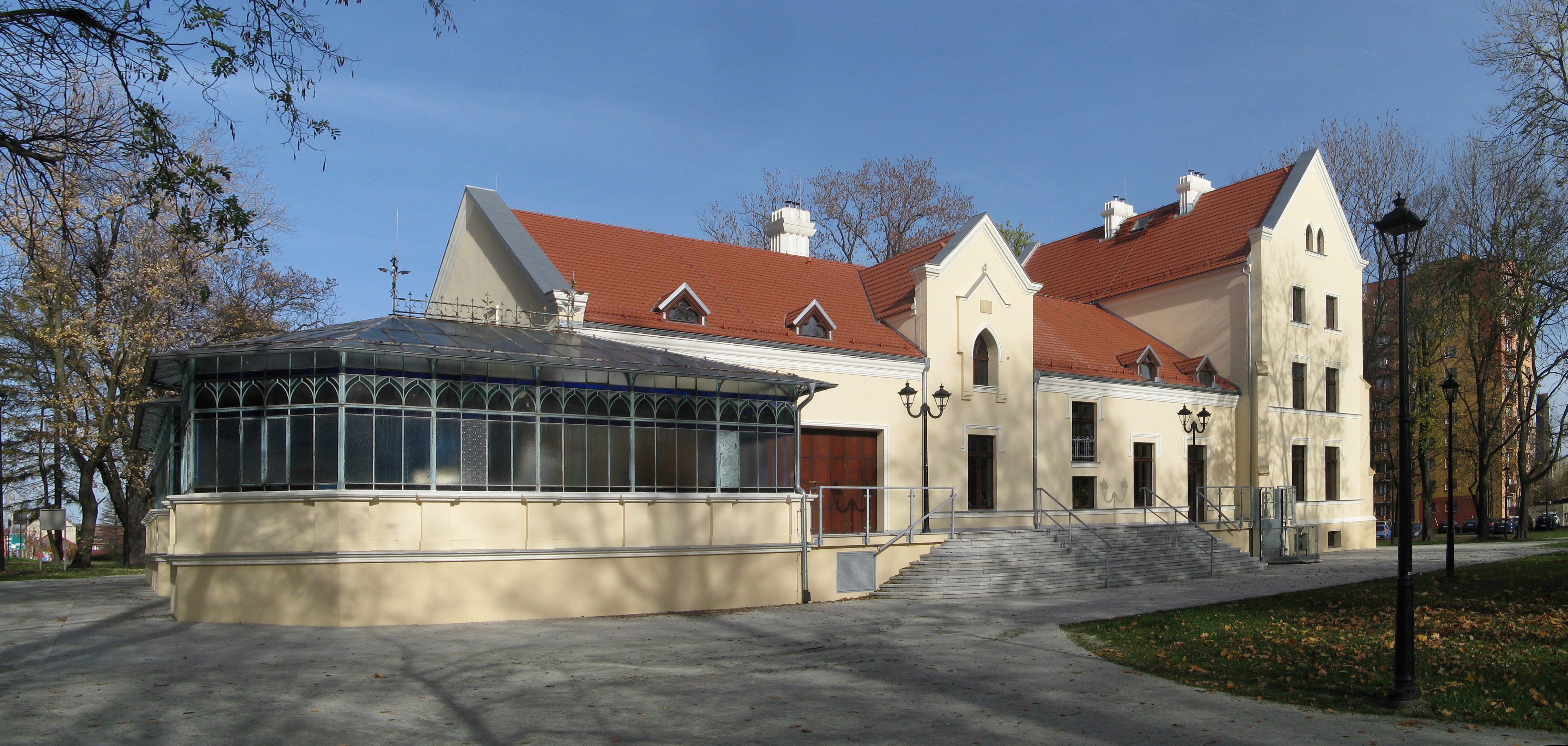 Pałac Rheibabenów w Siemianowicach Śląskich, z lewej pałacowa oranżeria.